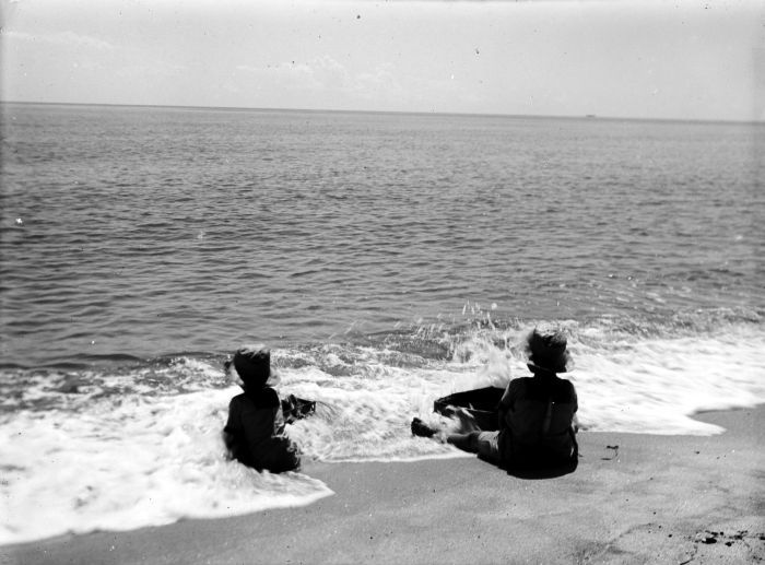 Negatief. Een tweetal Europese kinderen langs de vloedlijn op het strand bij Perbaoengan